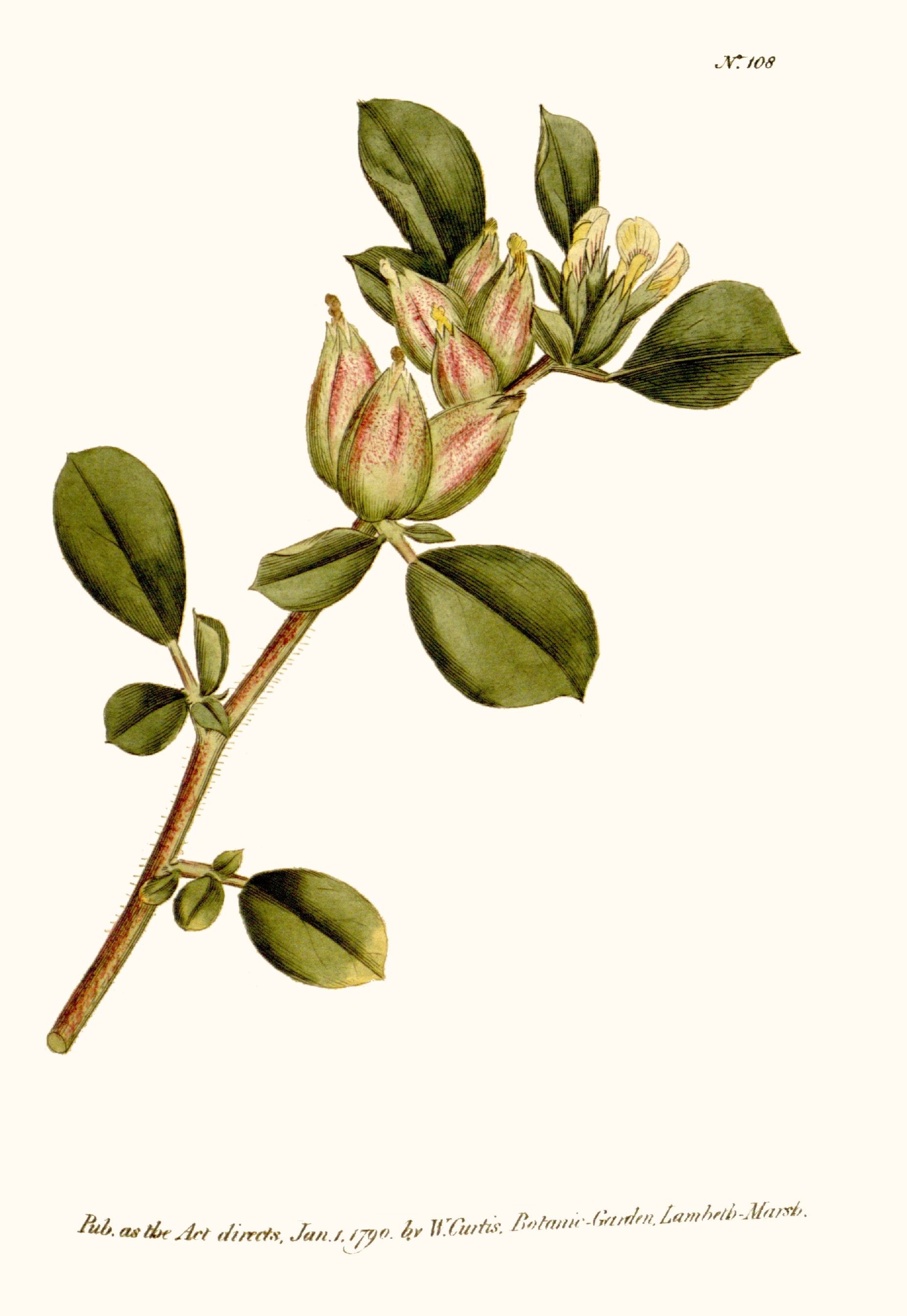 Tripodion tetraphyllum (L.) Fourr. - Anthyllide à 4 feuilles